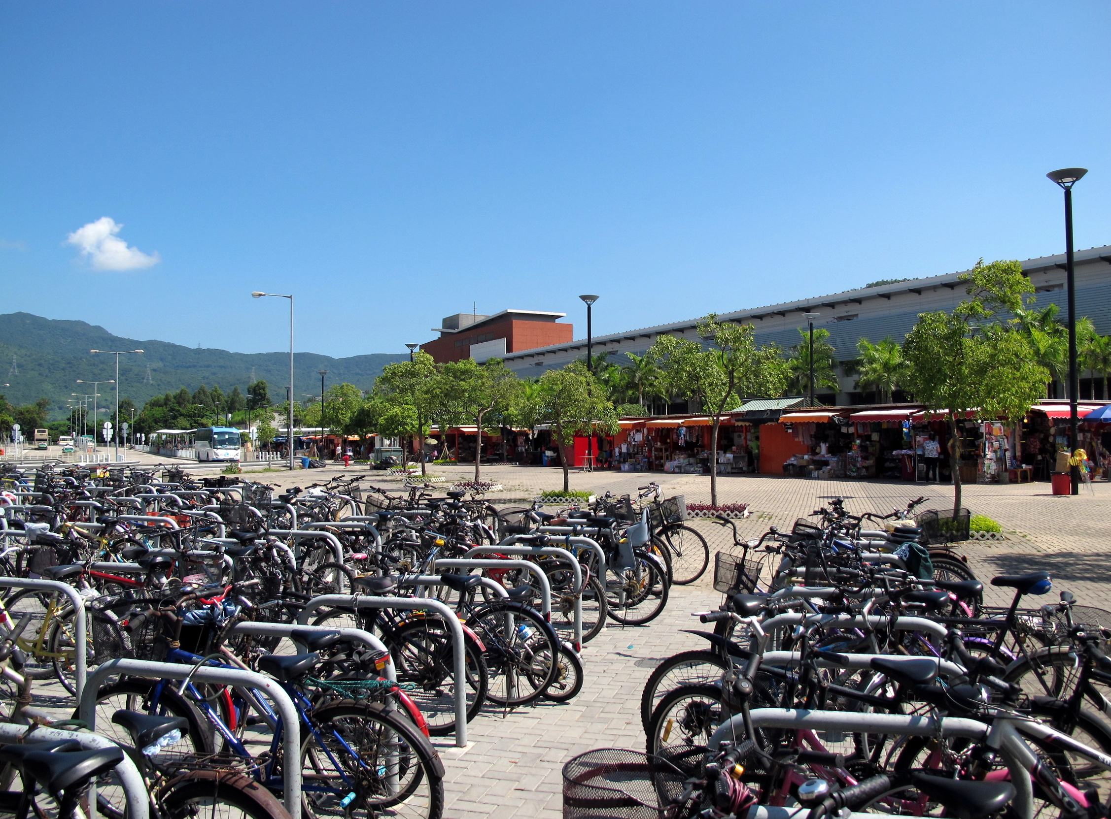 Kam Sheung Road Station Outside View